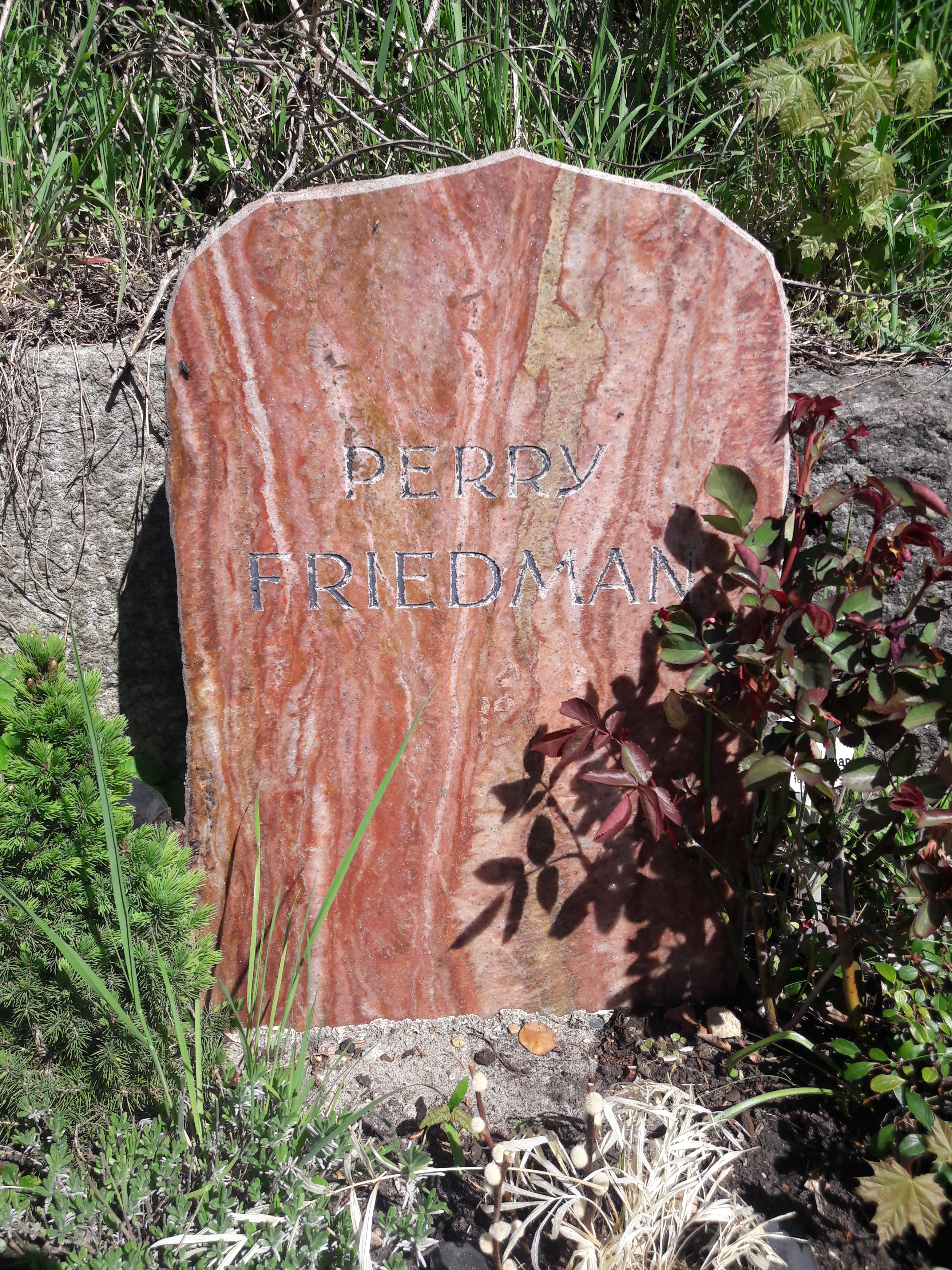 Grabmal Perry Friedmans auf dem St. Petri-Luisenstadt-Kirchhof, Friedrichshain, Berlin